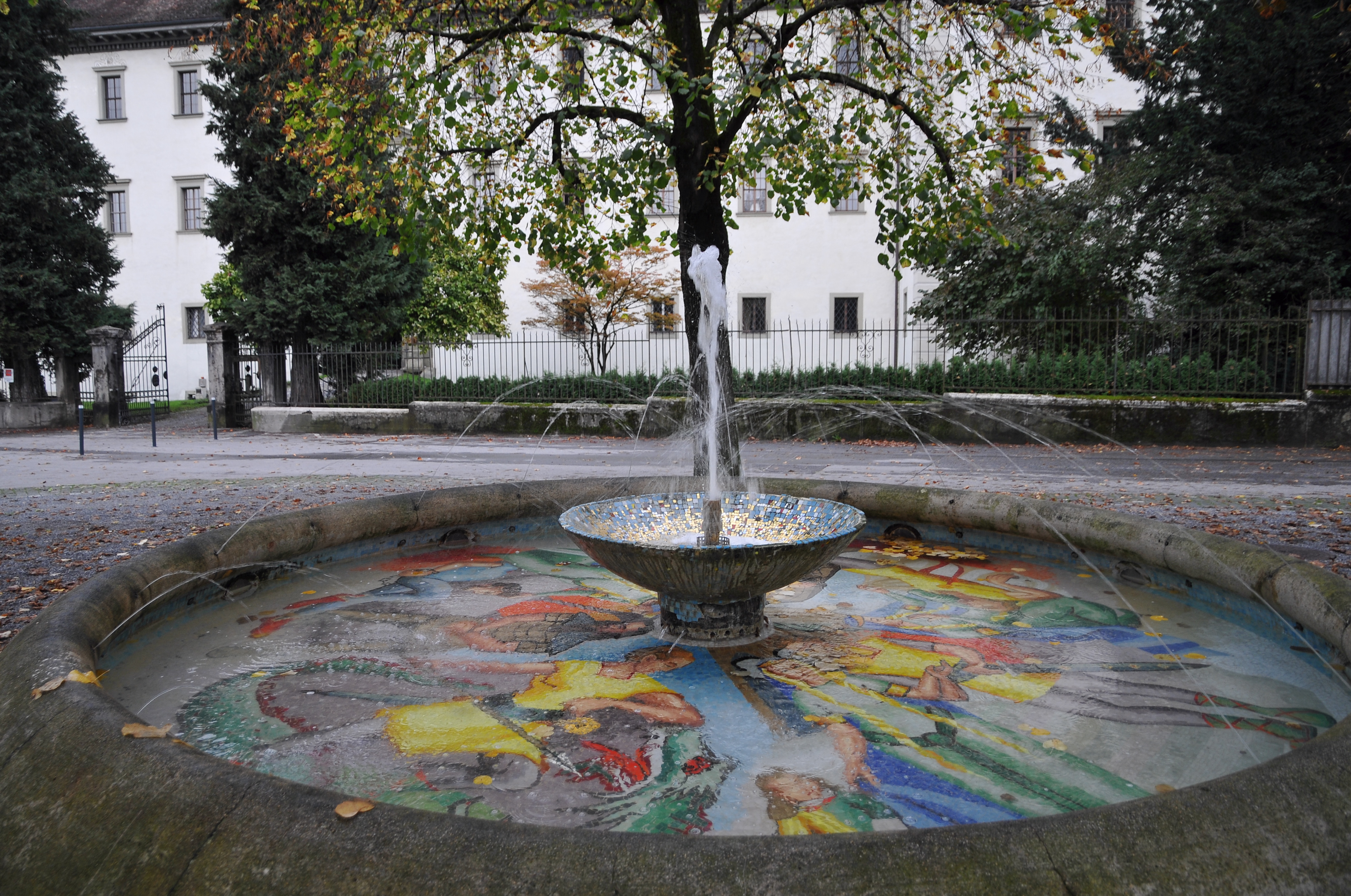 Der Nibelungenbrunnen am Schloßplatz in Hohenems. Dahinter der Palast Hohenems. Palast Hohenems